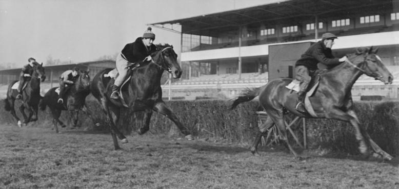 Berlin, Galopprennbahn, Training Zentralbild Studrè 15.4.1965 Training auf der Hoppegartner Parkbahn Jeden Morgen absolvieren Reiter und Pferd auf der Hoppegartner Parkrennbahn ihr Training. Nach dem Eröffnungsrennen am 11.4.1965 auf Europas schönster Parkrennbahn in Berlin-Hoppegarten beginnt am 18.4.1965 (Ostersonntag) um 15.00 Uhr das Rennen um den Preis von Dahlwitz.